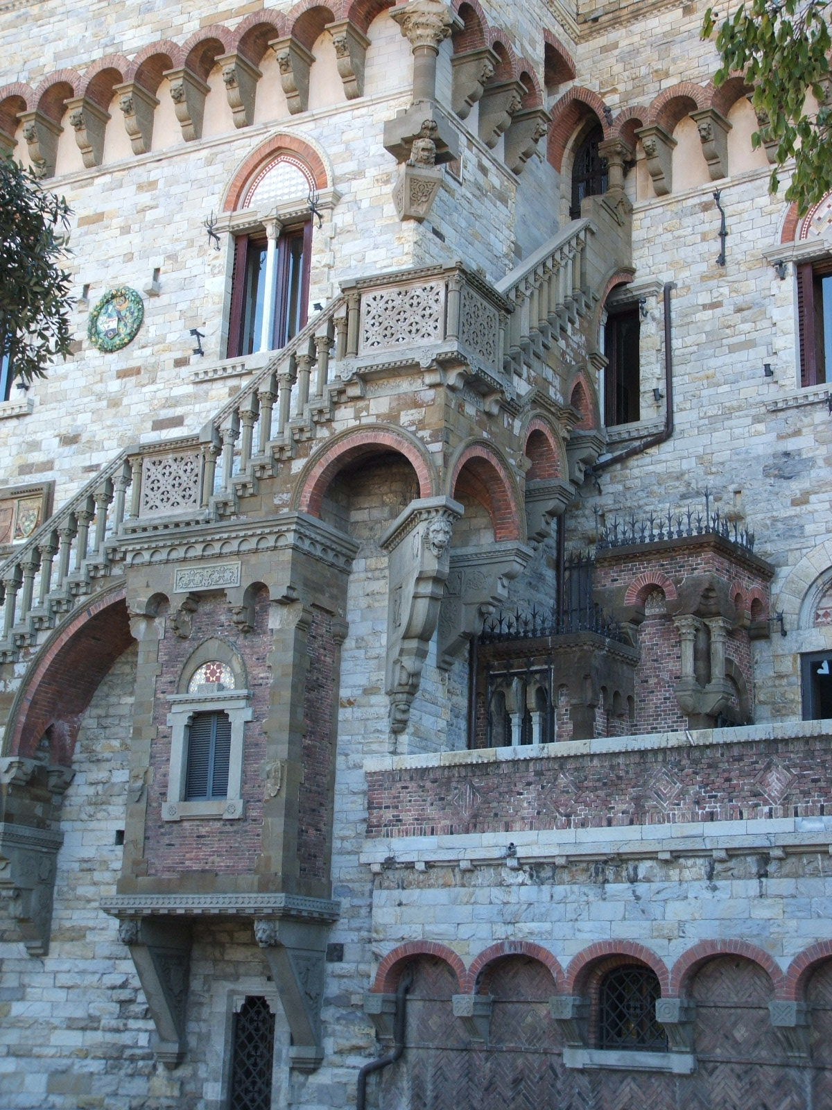 Genova, Castello Mackenzie